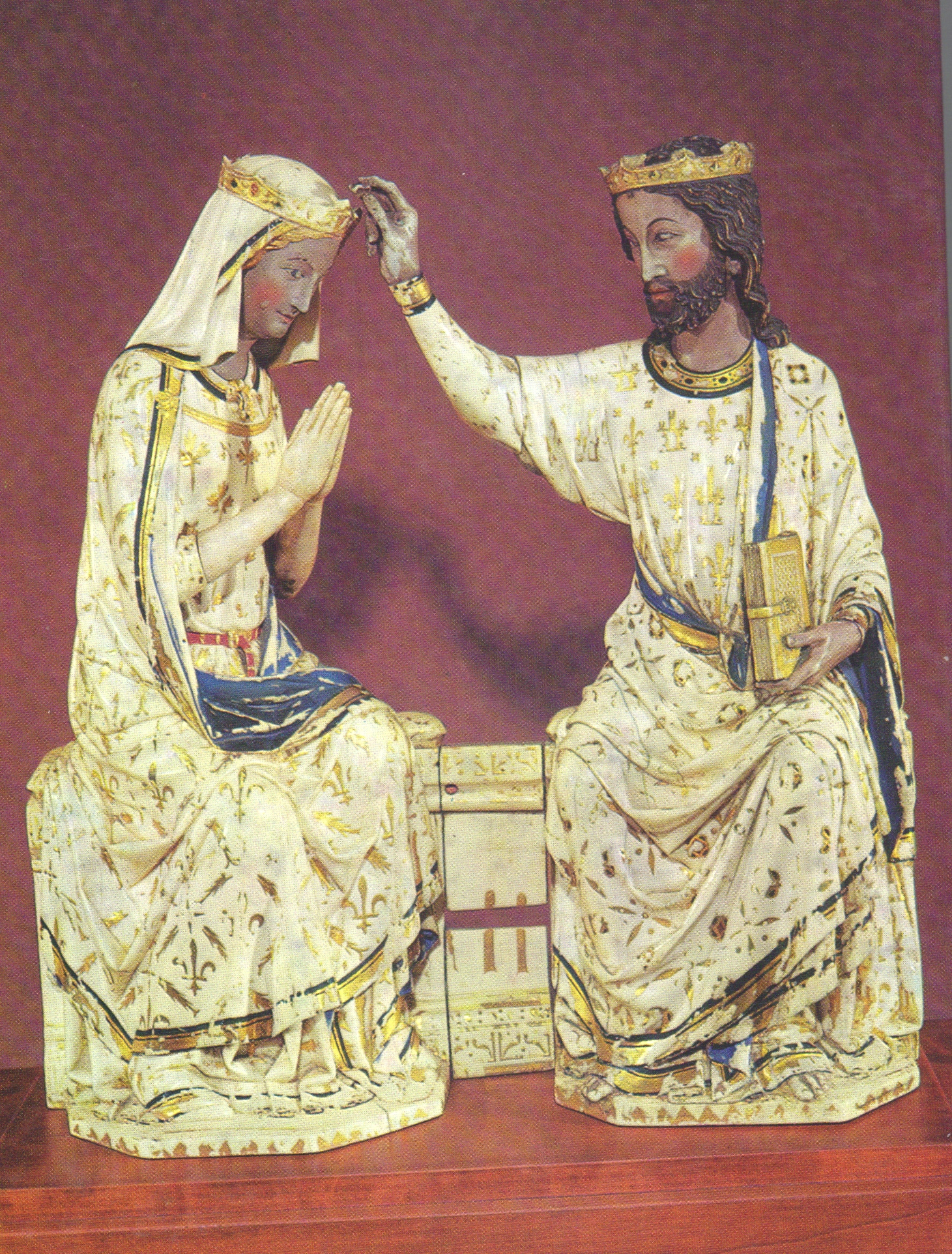 Couronnement de la Vierge, ivoire parisien, 13e siècle. Musée du Louvre, département des objets d'art